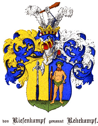 Familienwappen derer von Riesenkampf gennant Rehekampf (Riesenkapff gen. Rehekampff)